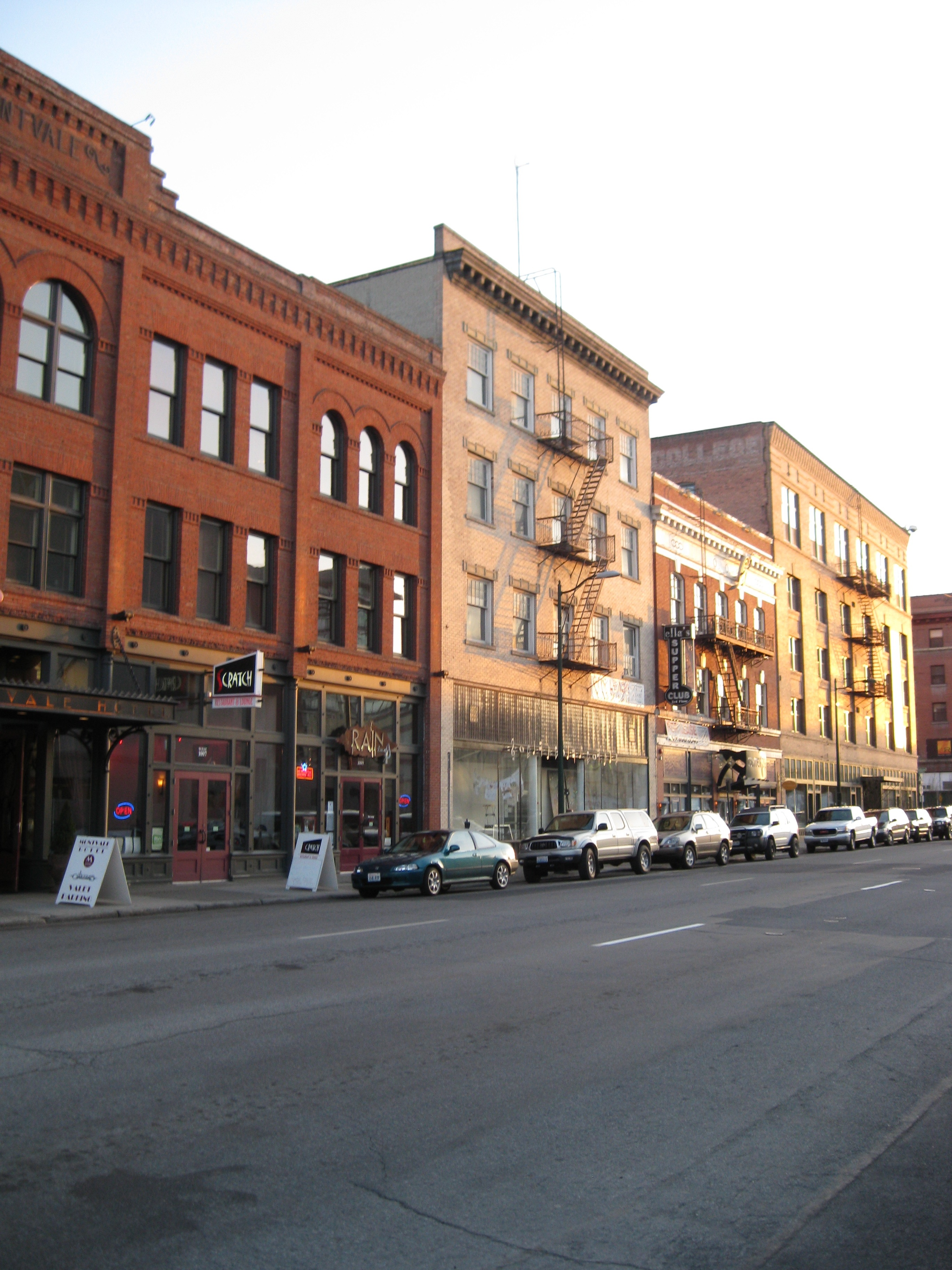 Downtown, Spokane, Etats-Unis, Etat de Washington